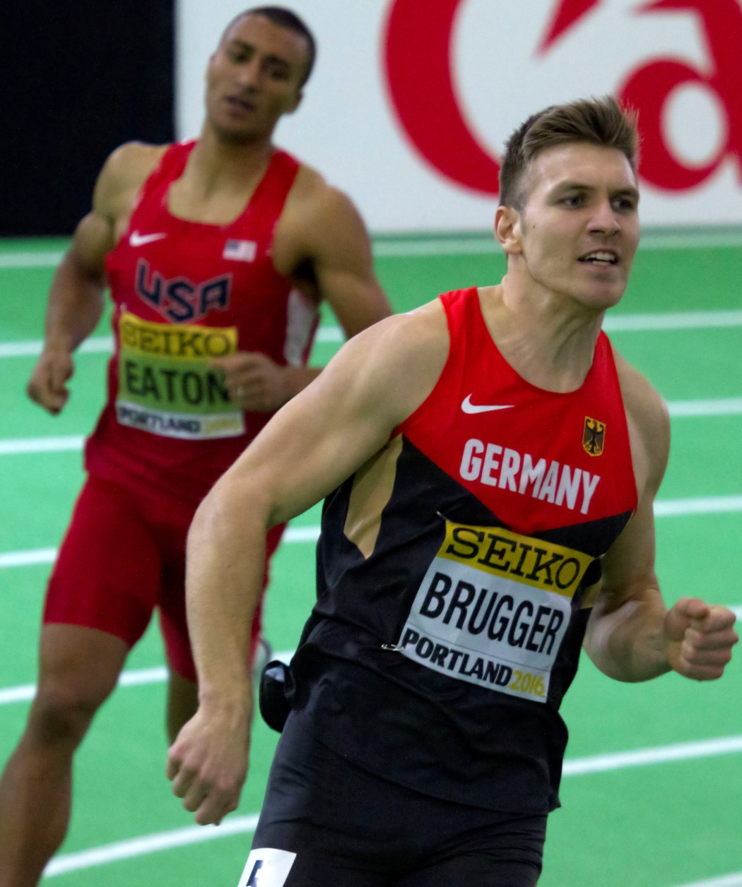 540 800m meerkamp